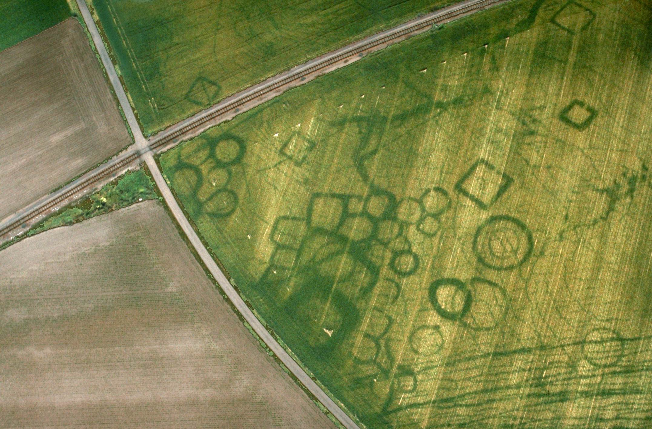 photo aérienne de GREZAC (17) Période protohistorique. Grande nécropole gauloise avec diverses structures funéraires. Circulaires ou carrés, de toutes tailles, ces "monuments funéraires" abritaient des sépultures à incinération.